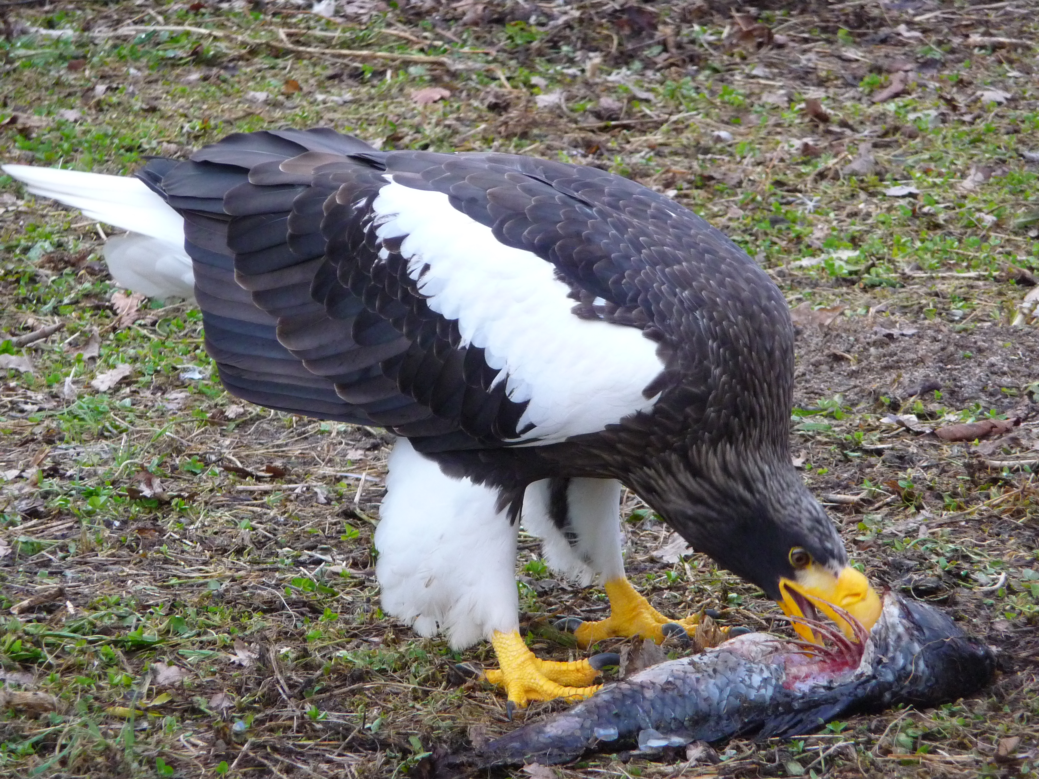 Riesenseeadler (Haliaeetus pelagicus) beim Fressen eines Fischs